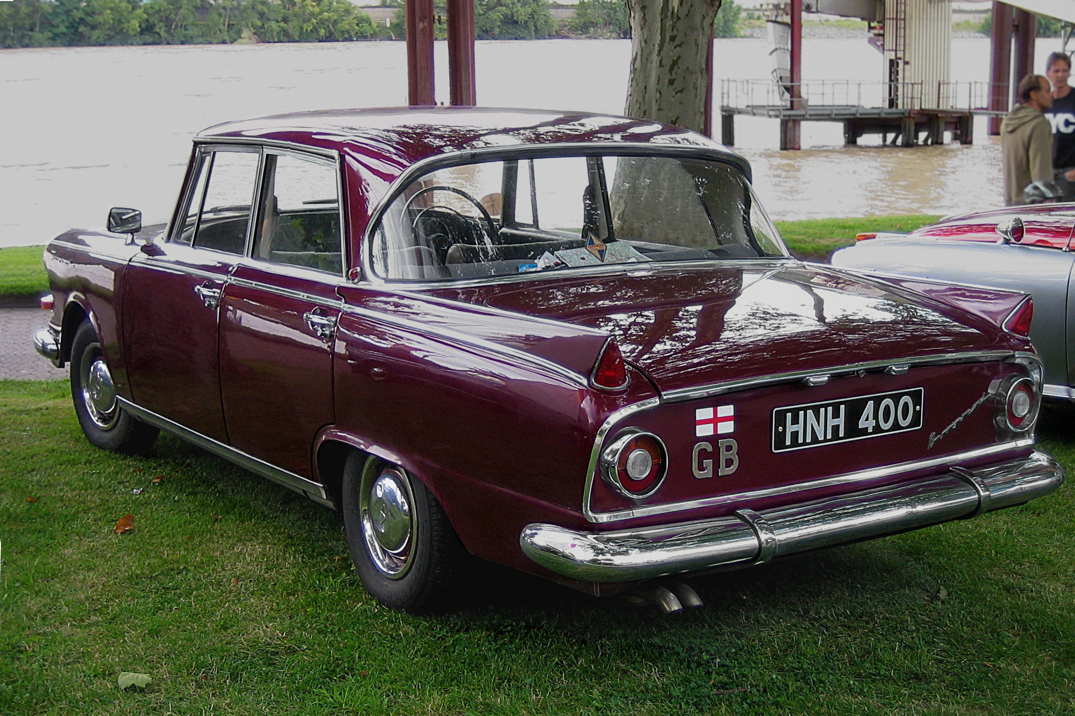 Bildbeschreibung: Borgward P 100 (Bauzeit 1960/61) Fotograf: Lothar Spurzem Datum: 26.08.2005 beim Borgwardtreffen in Andernach Sonstiges: Erstes deutsches Auto mit Luftfederung